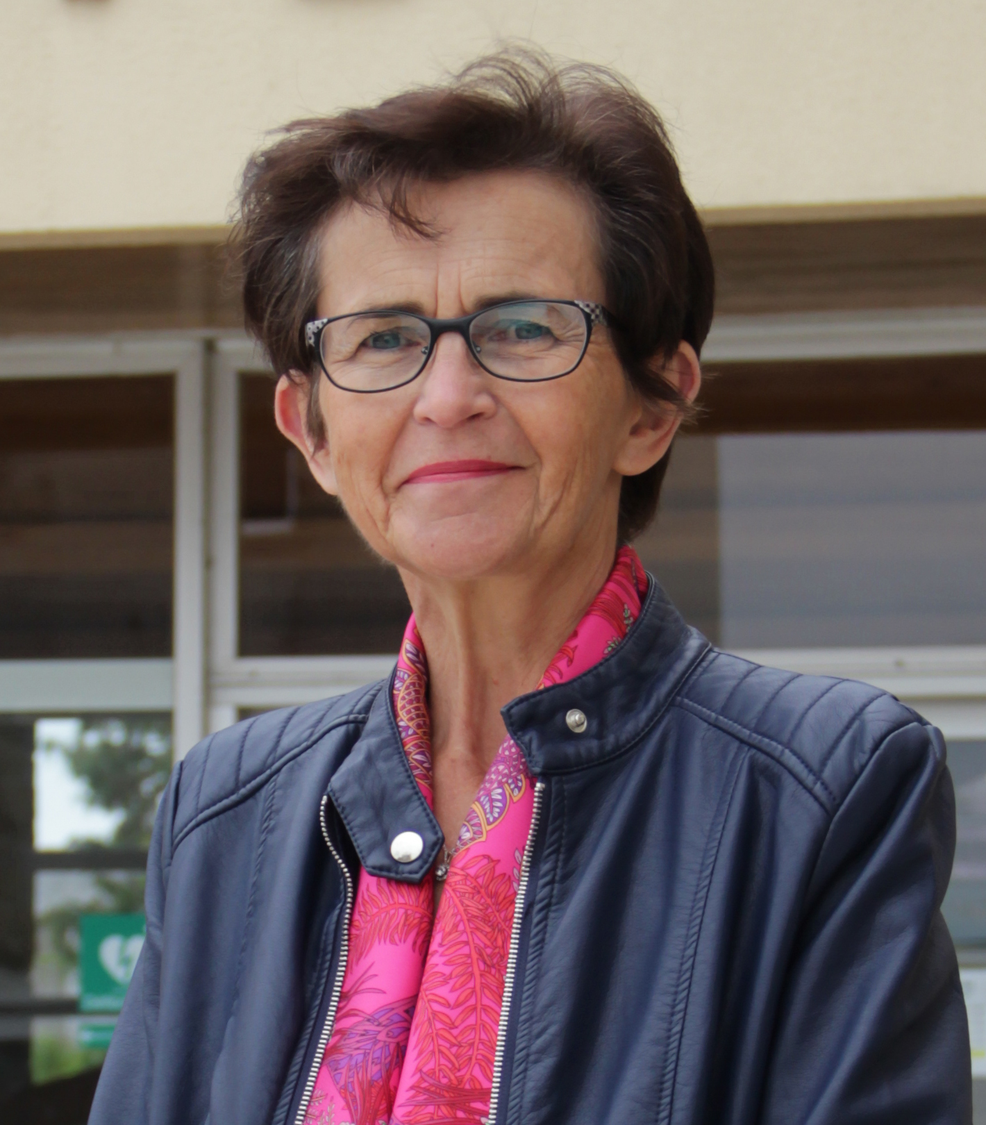 Portrait de Marguerite Lamour, maire de Ploudalmézeau (Finistère).